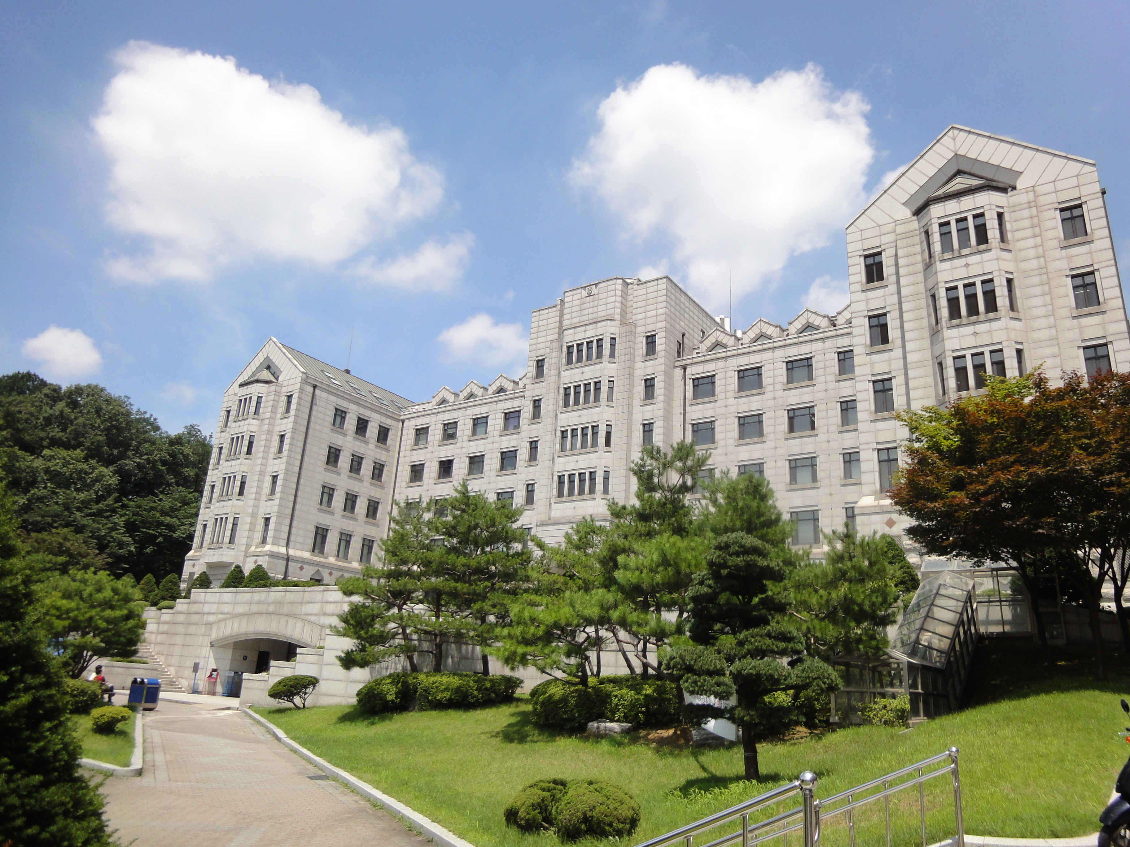 연세대학교 풍경